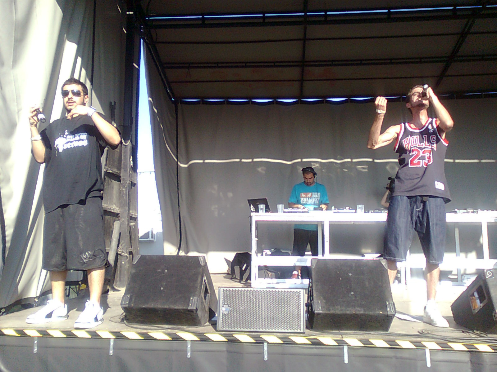 Artistas del Grupo A3Bandas rapeando en directo en un concierto en el Zaragoza Ciudad 2009